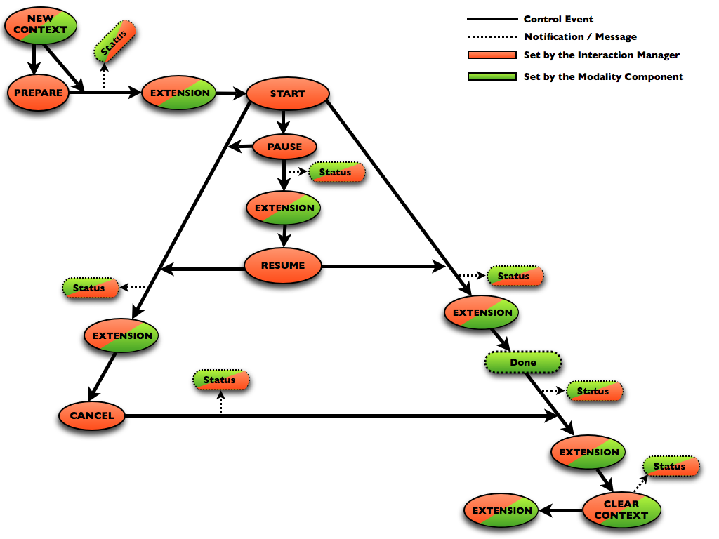 MMI Events Lifecycle